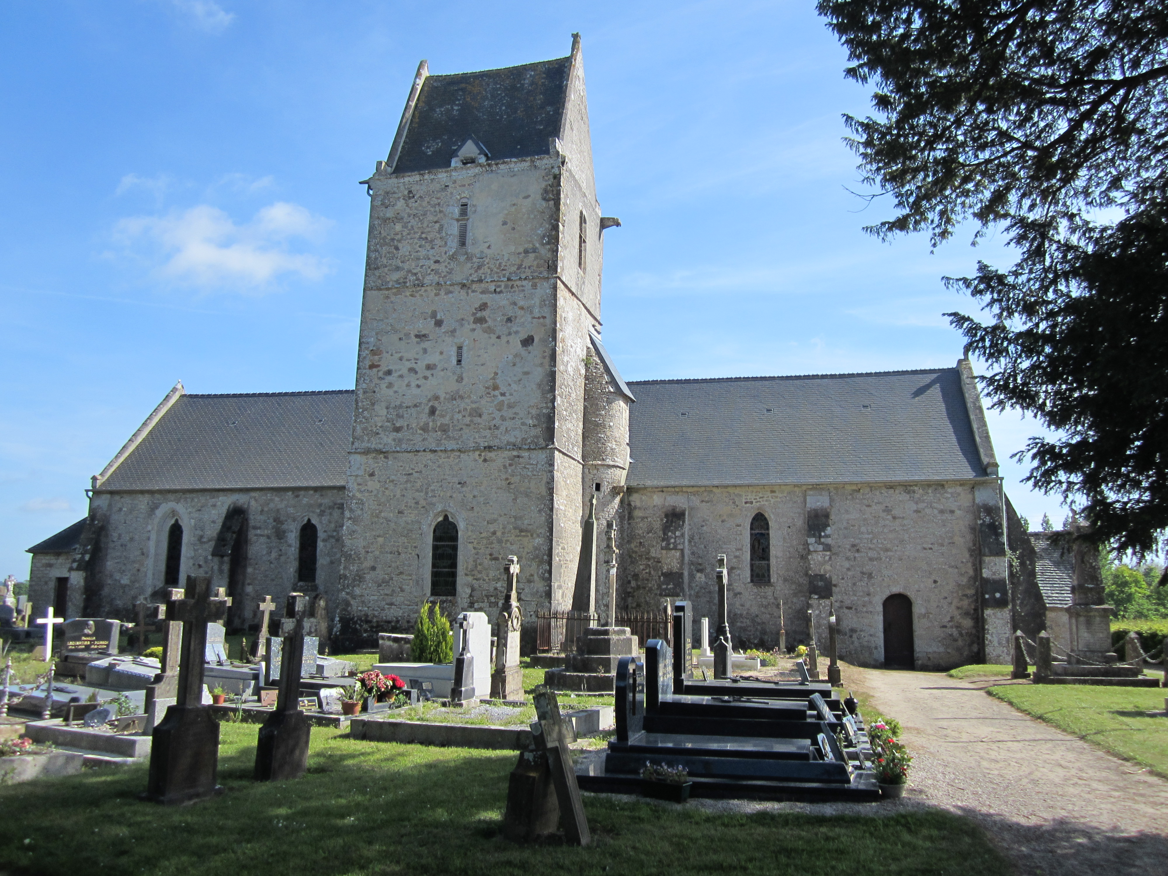 église Notre-Dame d'Hémevez